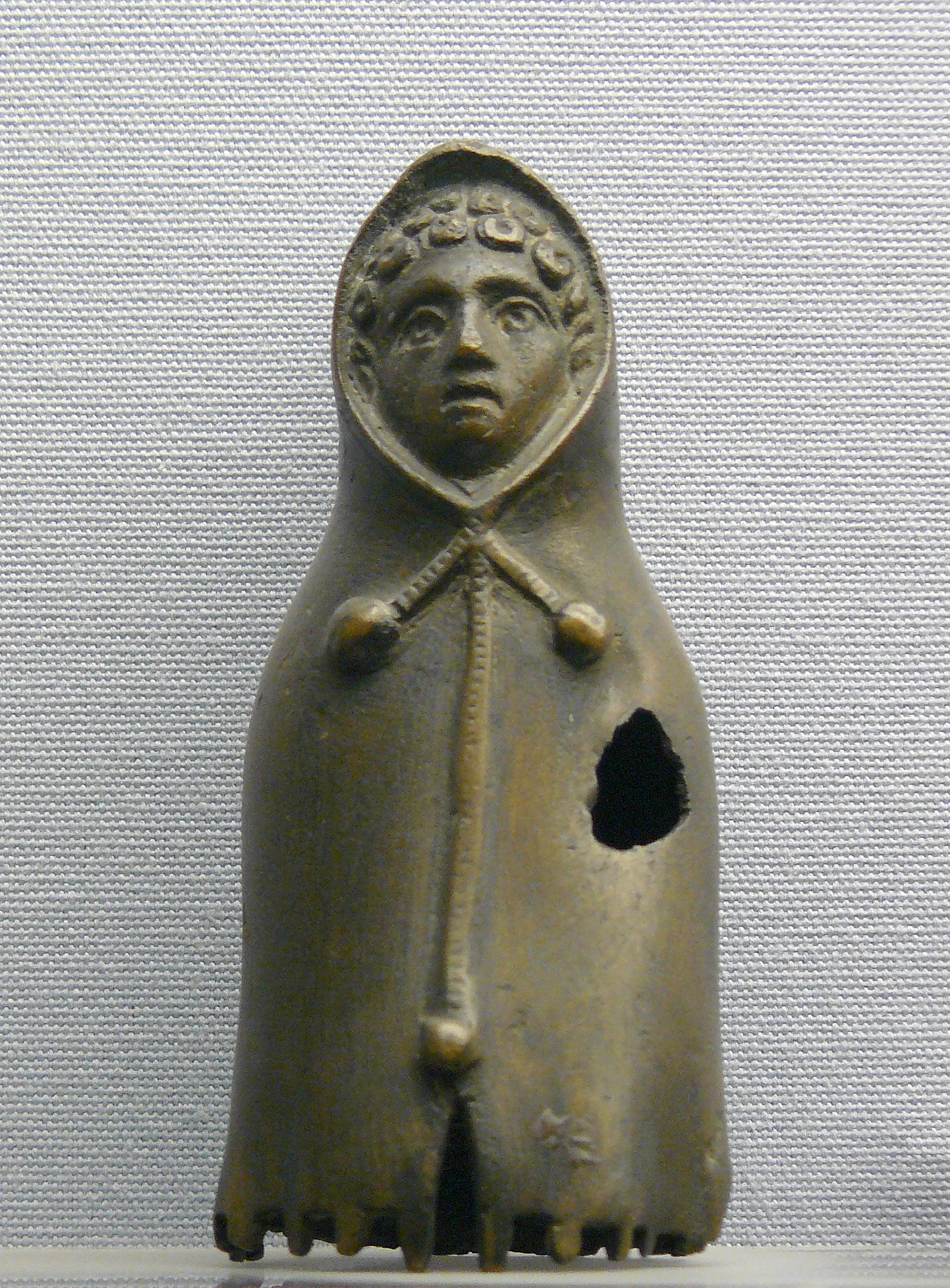 Statuette en bronze d'un enfant portant un manteau à capuchon, Champagne, vers le Ier siècle ap. JC. - Musée d"archéologie nationale de Saint-Germain-en-Laye, Inv n° 31 436